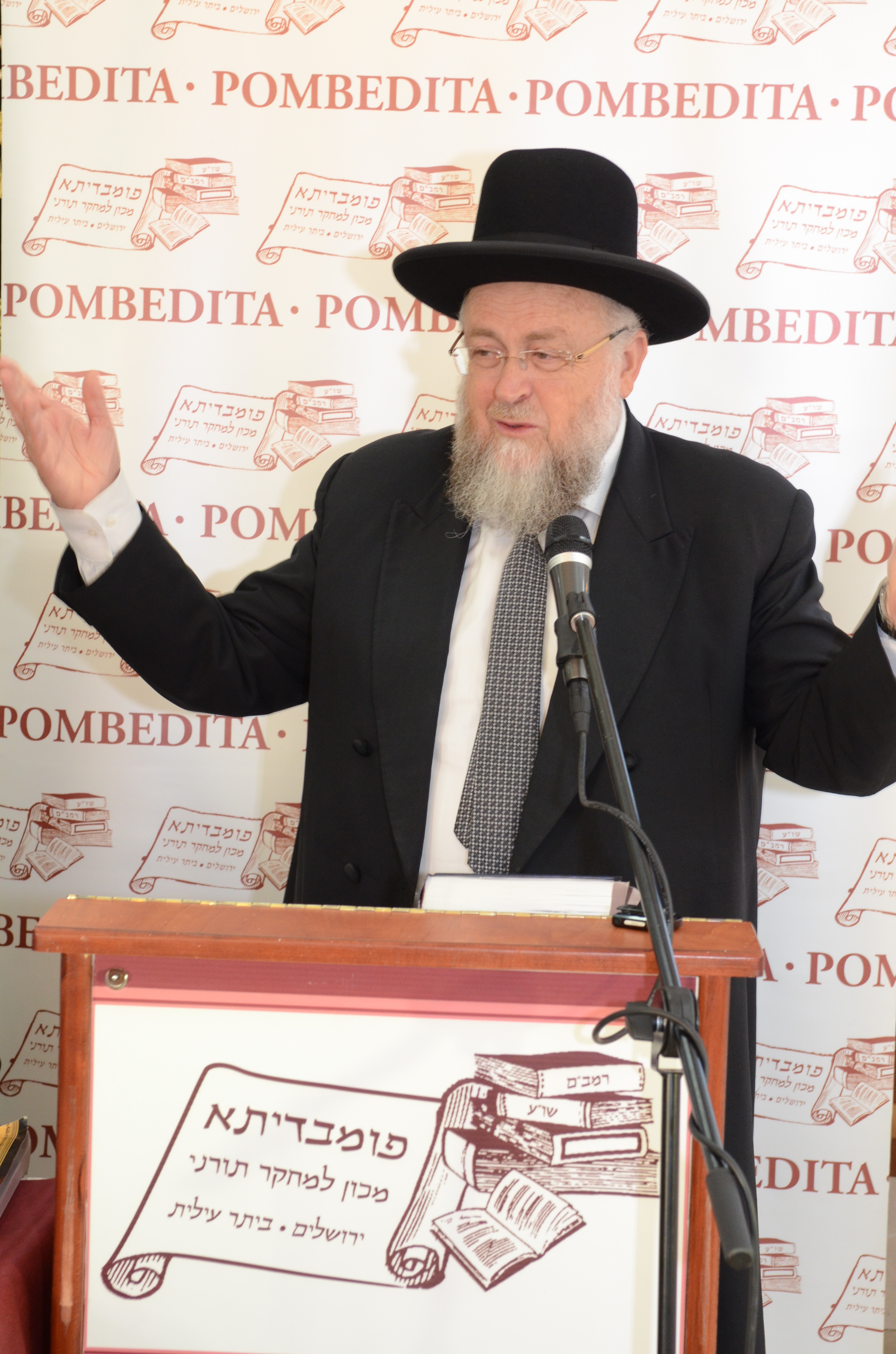 הרב אליהו שלזינגר, נואם בכנס דיני ממונות של מכון מחקר תורני פומבדיתא